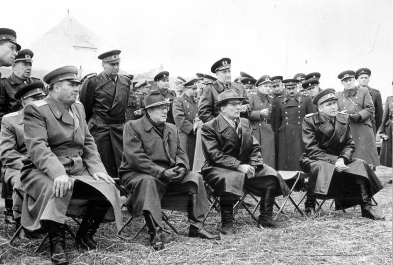 NVA-Übung, Ehrengäste Während einer Übung der NVA im Süden der DDR v.l.n.r. sitzend: I[wan] I. Jakubowski, Otto Grotewohl, Erich Honecker, Heinz Hoffmann; MDB/Zühlsdorf Abgebildete Personen: Grotewohl, Otto: Ministerpräsident, stellvertretender Staatsratsvorsitzender, DDR (GND 118542680) Hoffmann, Heinz: Minister für Nationale Verteidigung, Mitglied des ZK der SED, DDR (GND 118552503) Honecker, Erich: Staatsratsvorsitzender, Generalsekretär des ZK der SED, DDR (GND 118553399) Jakubowski, Iwan I.: Armeegeneral, Sowjetunion (GND 107885816)